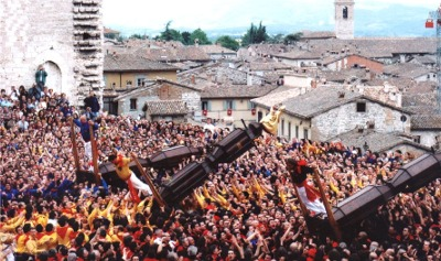 Festa dei Ceri Levée Gubbio Ombrie Italie